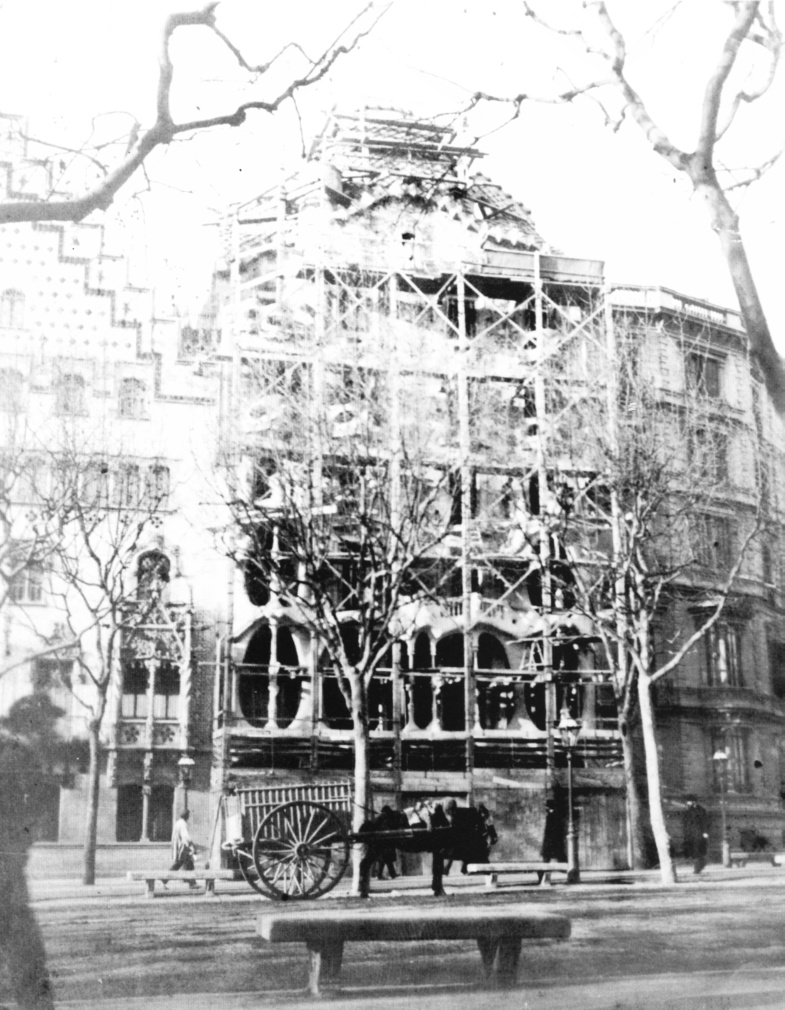 La Casa Batlló en obras (1906), foto de Domènec Sugrañes i Gras.